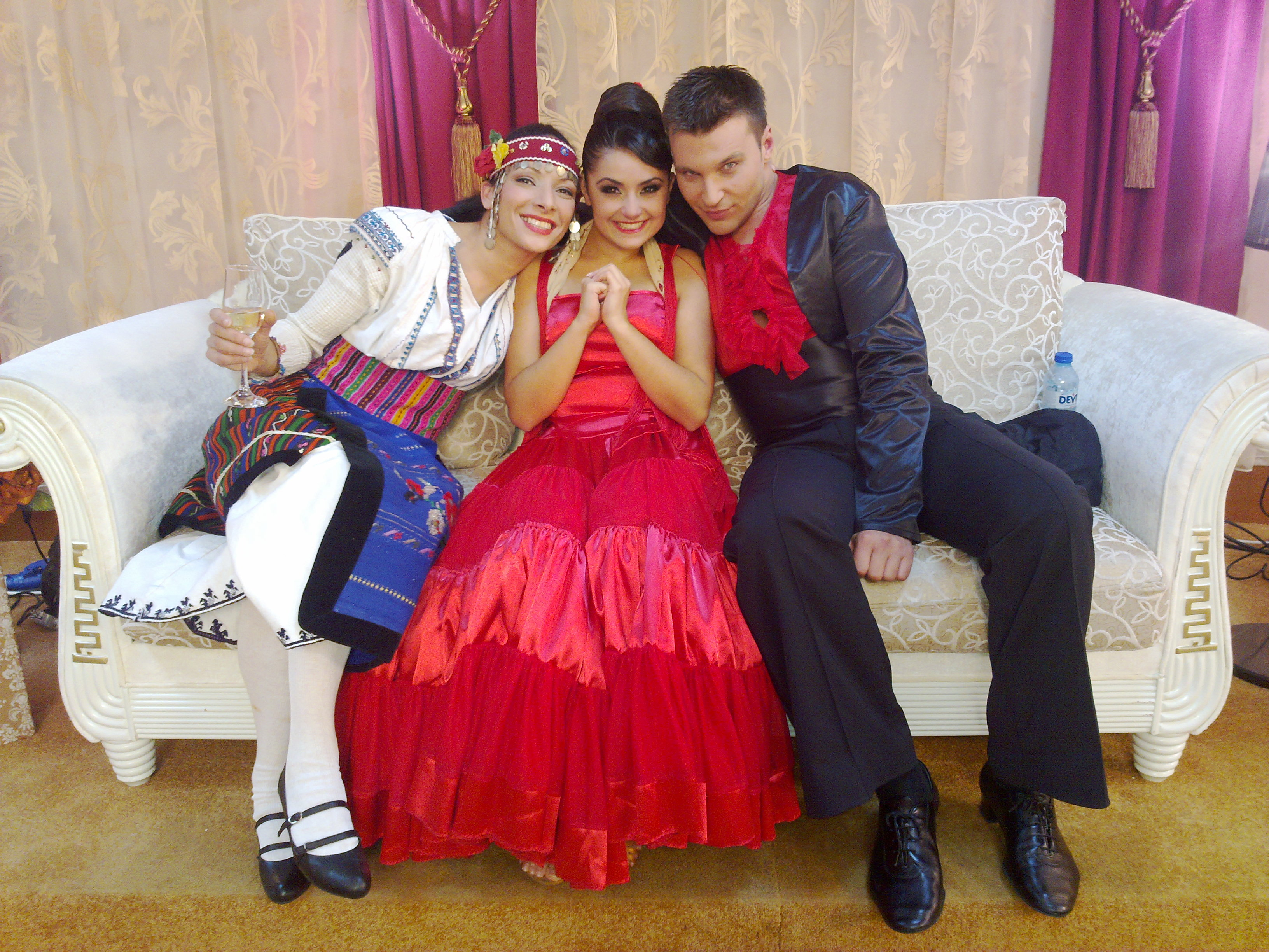 Росица Караджова (в центъра) с танцовия си партньор от предаването Байландо 2010 г. Христо Калоферов.